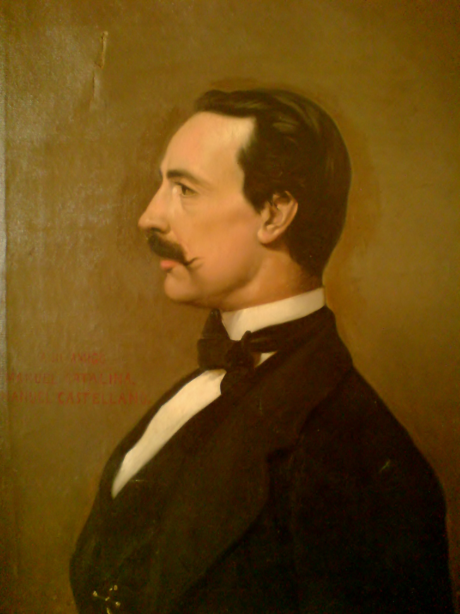 El actor Manuel Catalina: óleo sobre lienzo, obra del pintor Manuel Castellano (1826-1880)